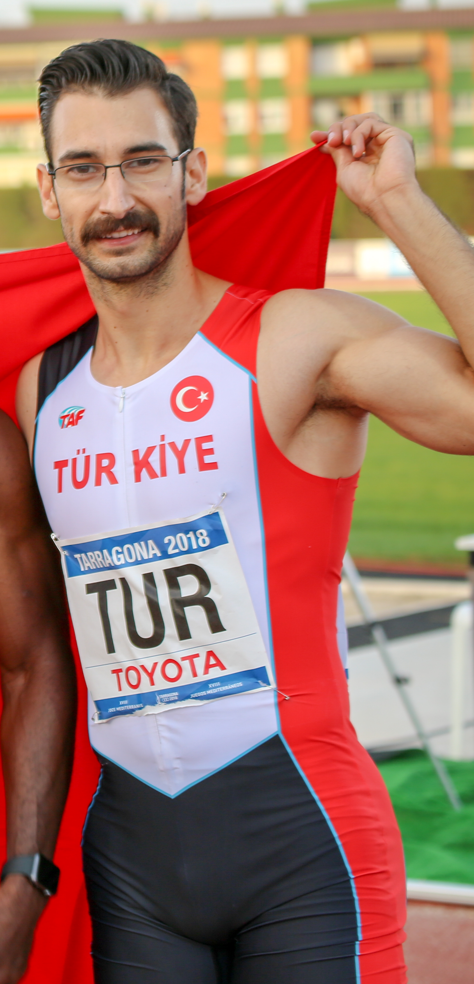 Turquía en los relevos 4x100 en los Juegos del Mediterráneo 2018 (Emre Zafer Barnes, Jak Ali Harvey, Yiğitcan Hekimoğlu, Ramil Guliyev)